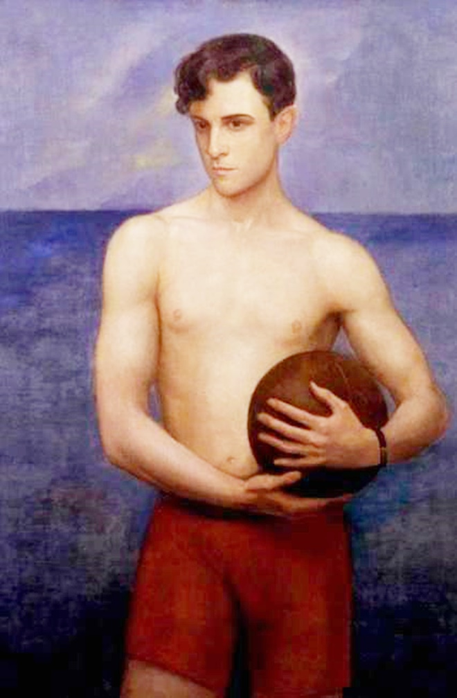 Ángel Zárraga (y) Argüelles (1886—1946). 'Retrato de Ramón Novarro' 1929 (Óleo sobre lienzo)